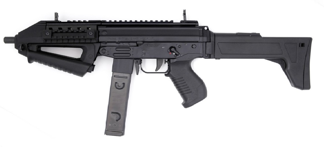 Subametralladora FAMAE SAF-200